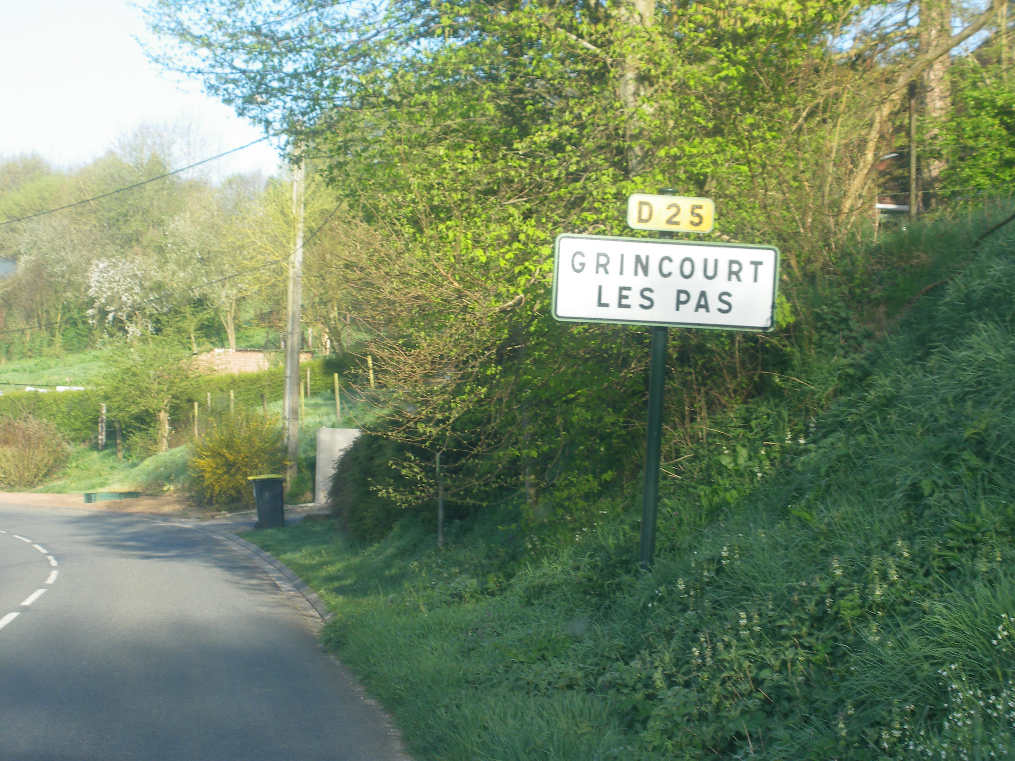 Panneau d'entrée de la commune de Grincourt-lès-Pas.